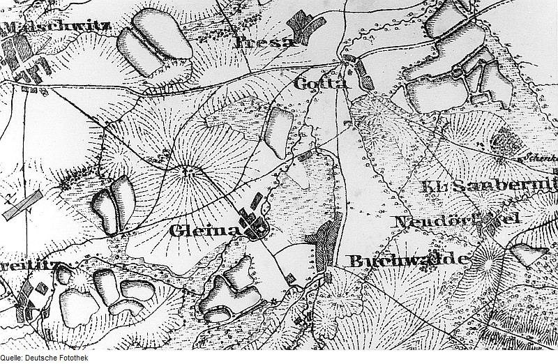 Original image description from the Deutsche Fotothek Malschwitz-Gleina. Ausschnitt aus der Karte: Die Schlacht bei Hochkirch den 14.10.1758